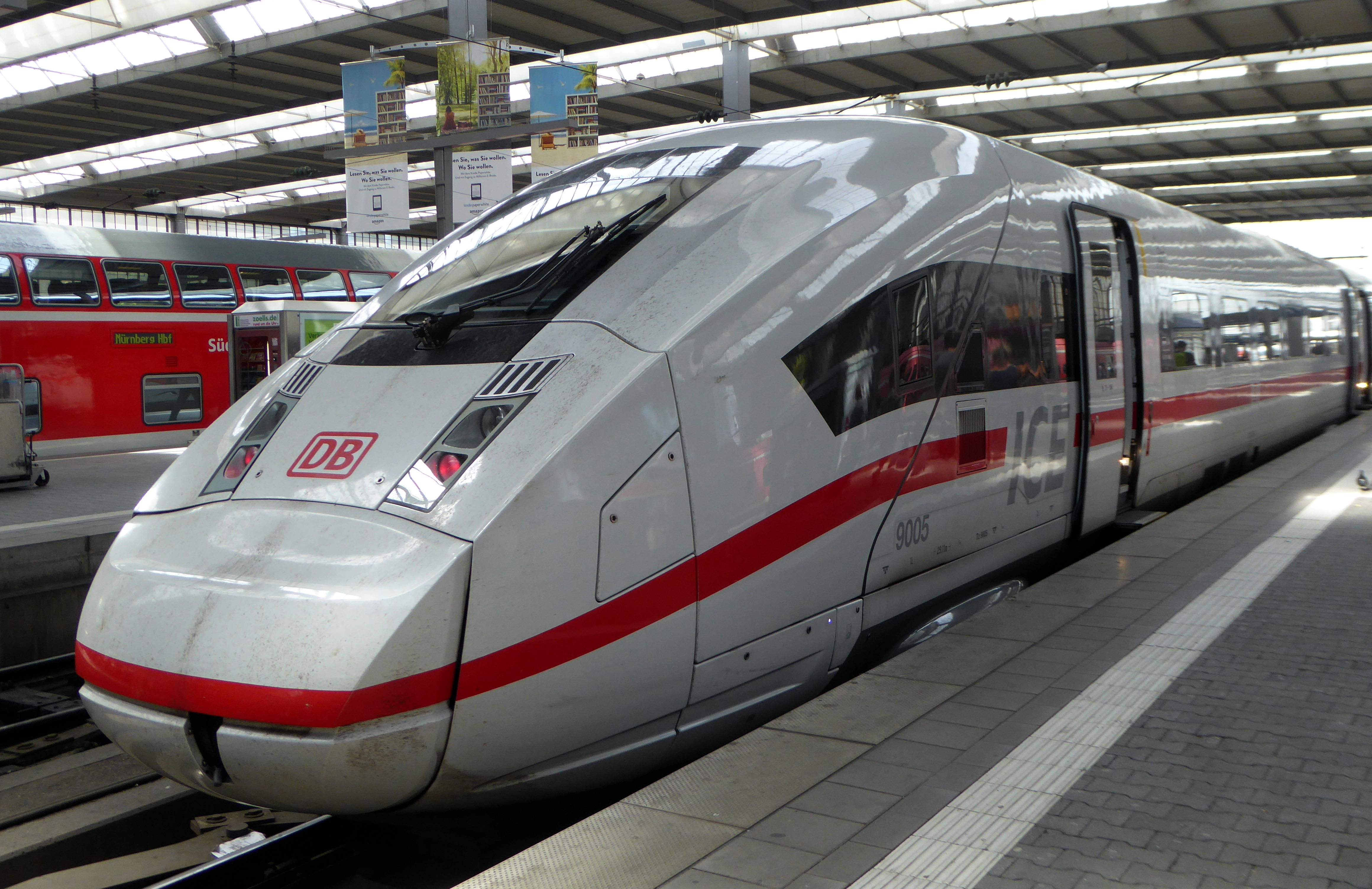 ICE 9005 (DBAG 412) in München Hbf.